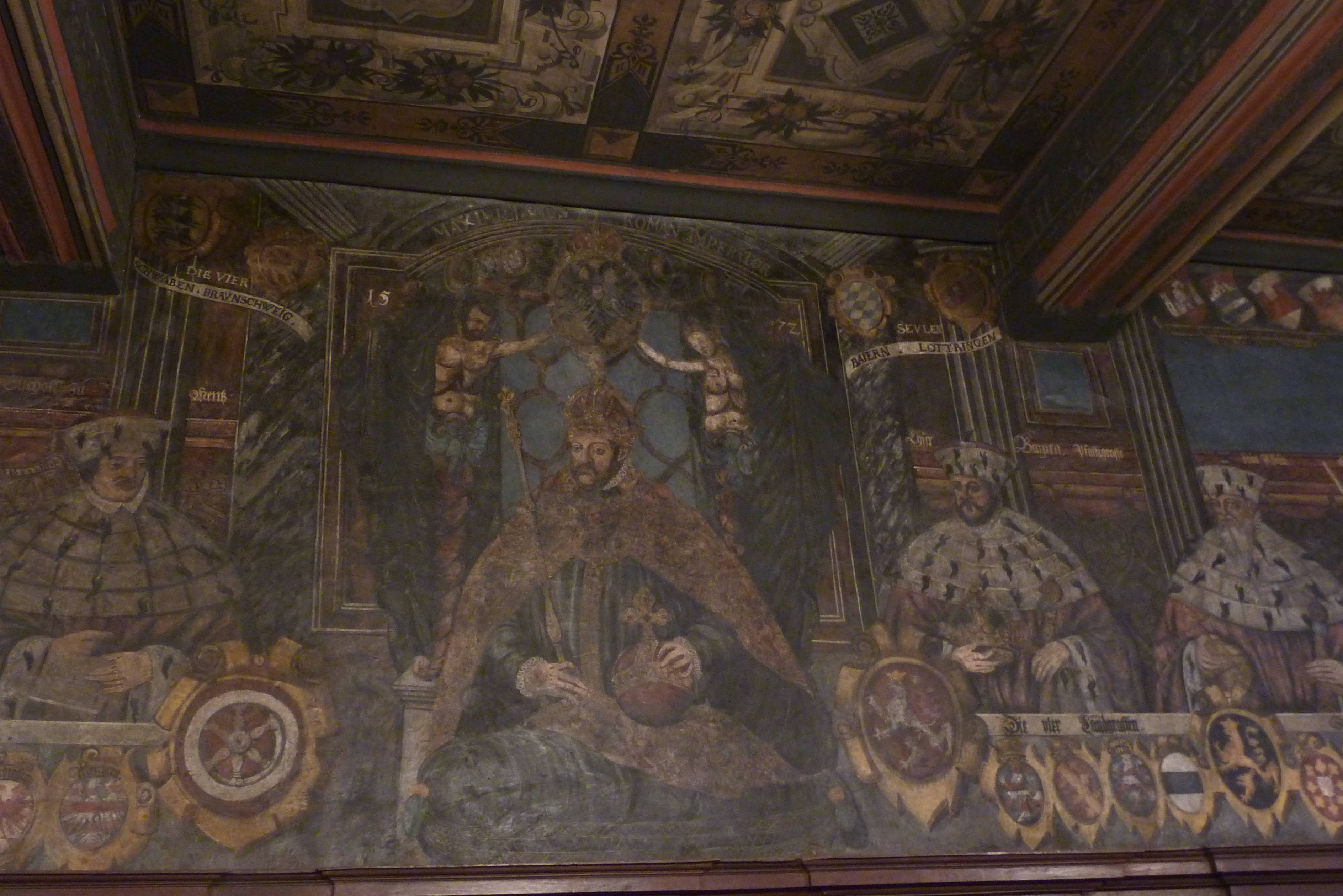 Große Ratsstube des Rathauses in Mühlhausen/Thüringen, Renaissance-Wandmalerei von Bernhard Stephan, von 1570/72; Darstellung: Fürstbischof von Mainz (links), Kaiser Maximilian II. (Mitte) und Kurfürst von Bayern (rechts), mit Inschriften und Wappen